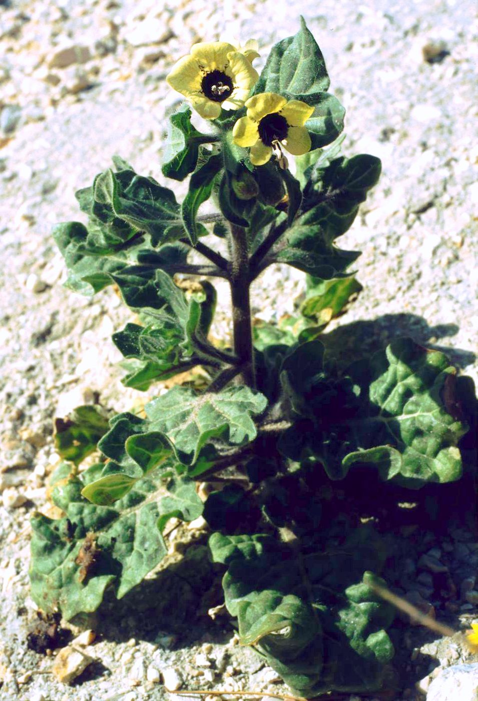 Hyoscyamus albus, Nachtschattengewächse (Solanaceae) – Griechenland/Ελλάδα/Greece: Erisos/Έρισος, Assos/Άσσος (Kefallinia/Κεφαλληνία)